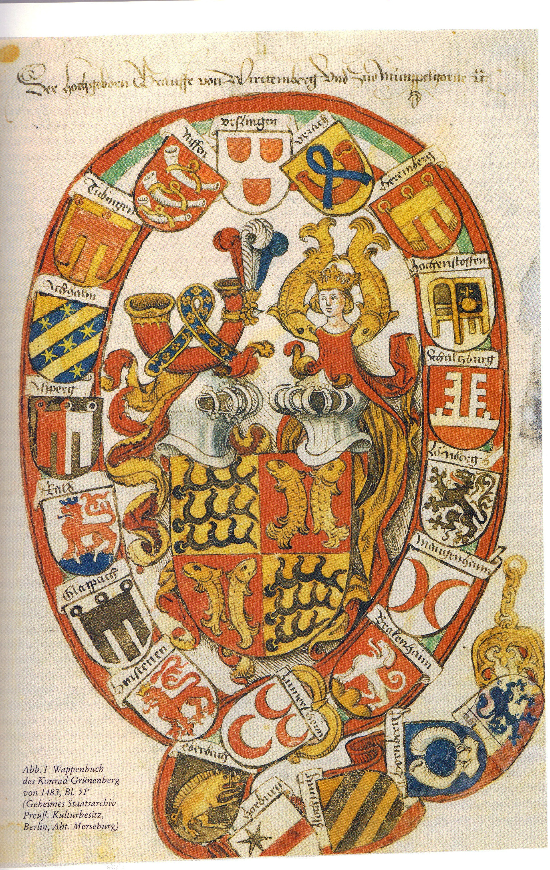 Wappenbuch des Konrad Grünenberg (1483 oder später), Geheimes Staatsarchiv Berlin, Bl. 51r